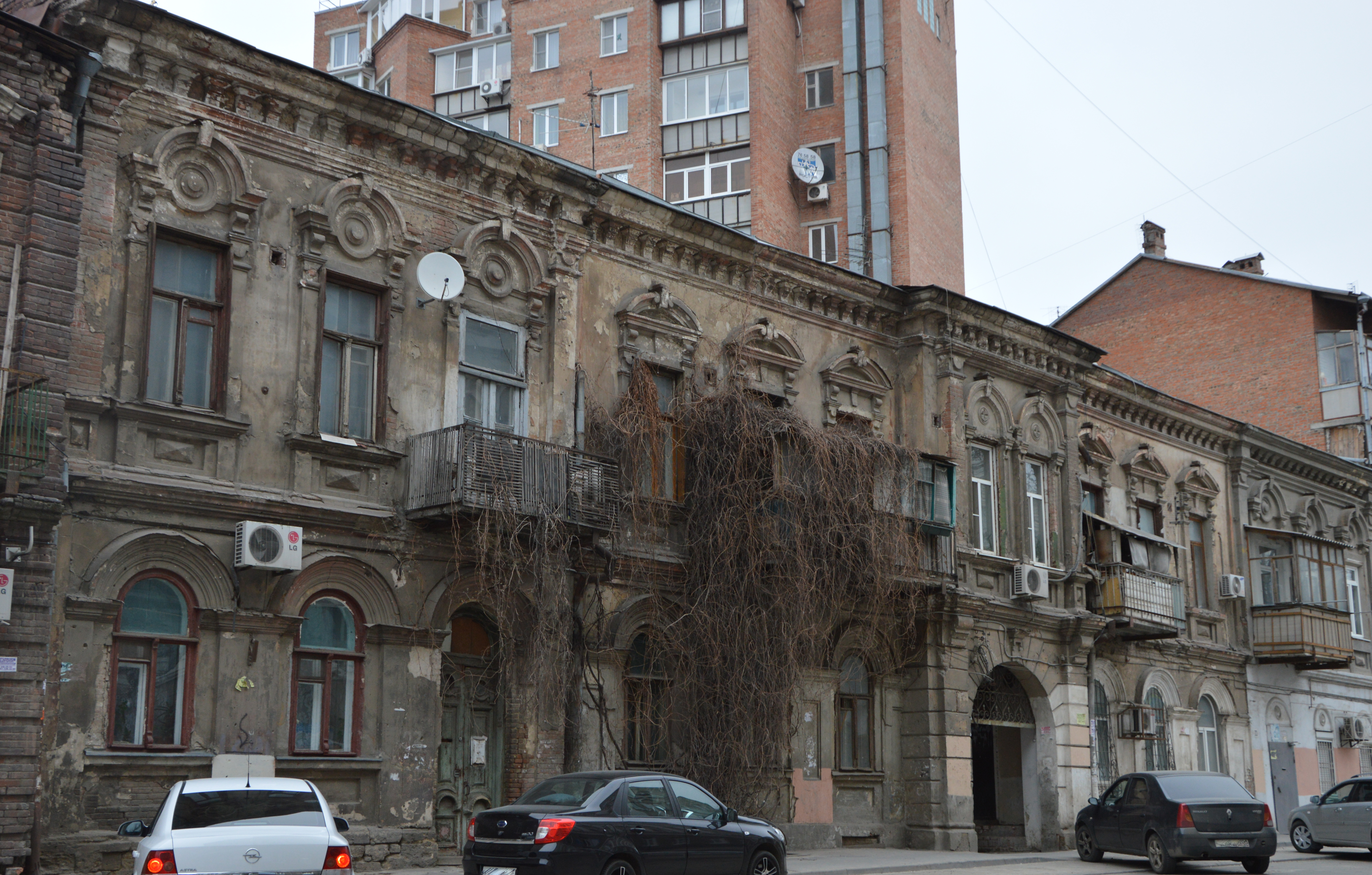 Здание города Ростова-на-Дону